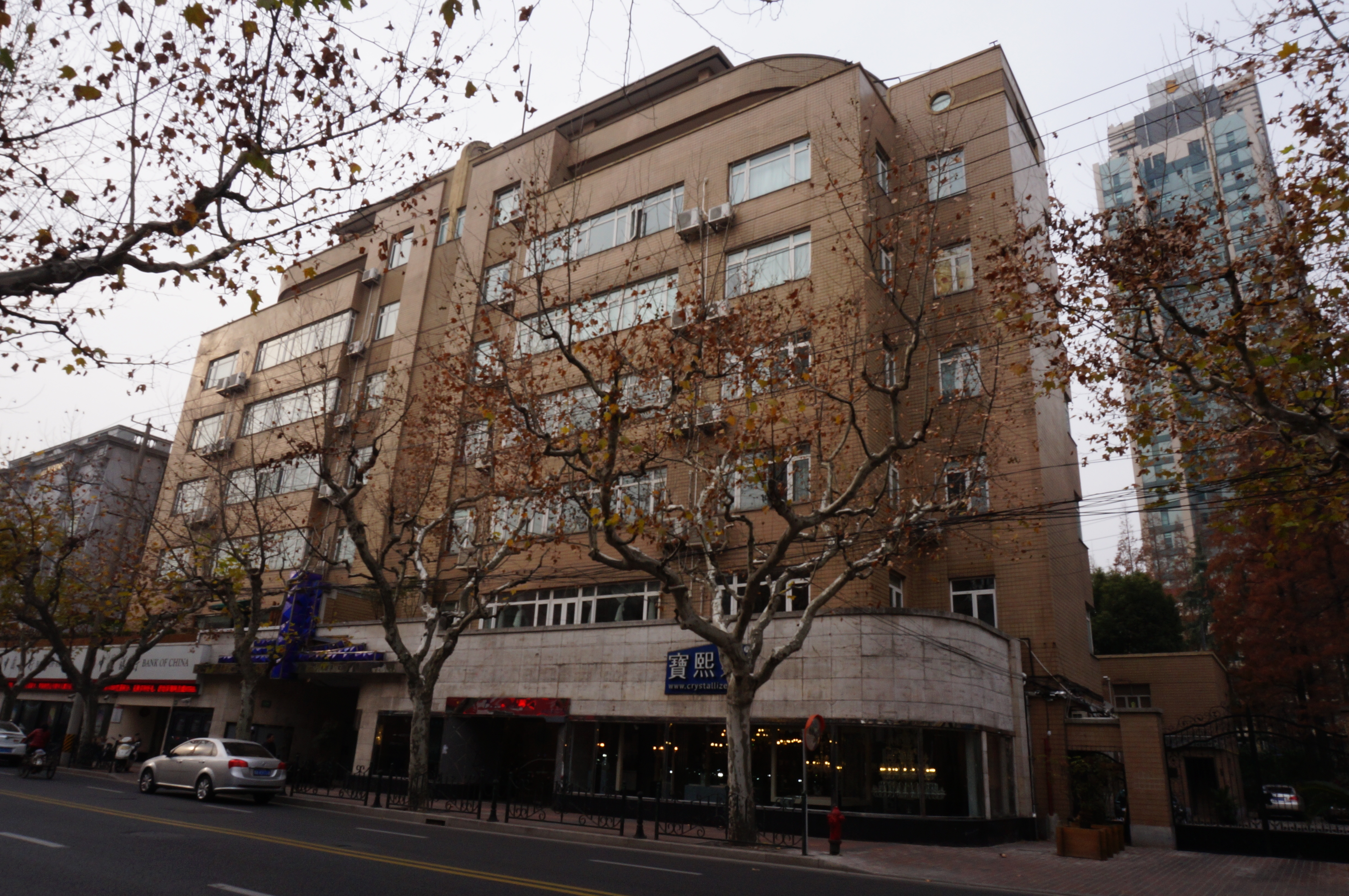 亨利公寓（今淮中大楼）